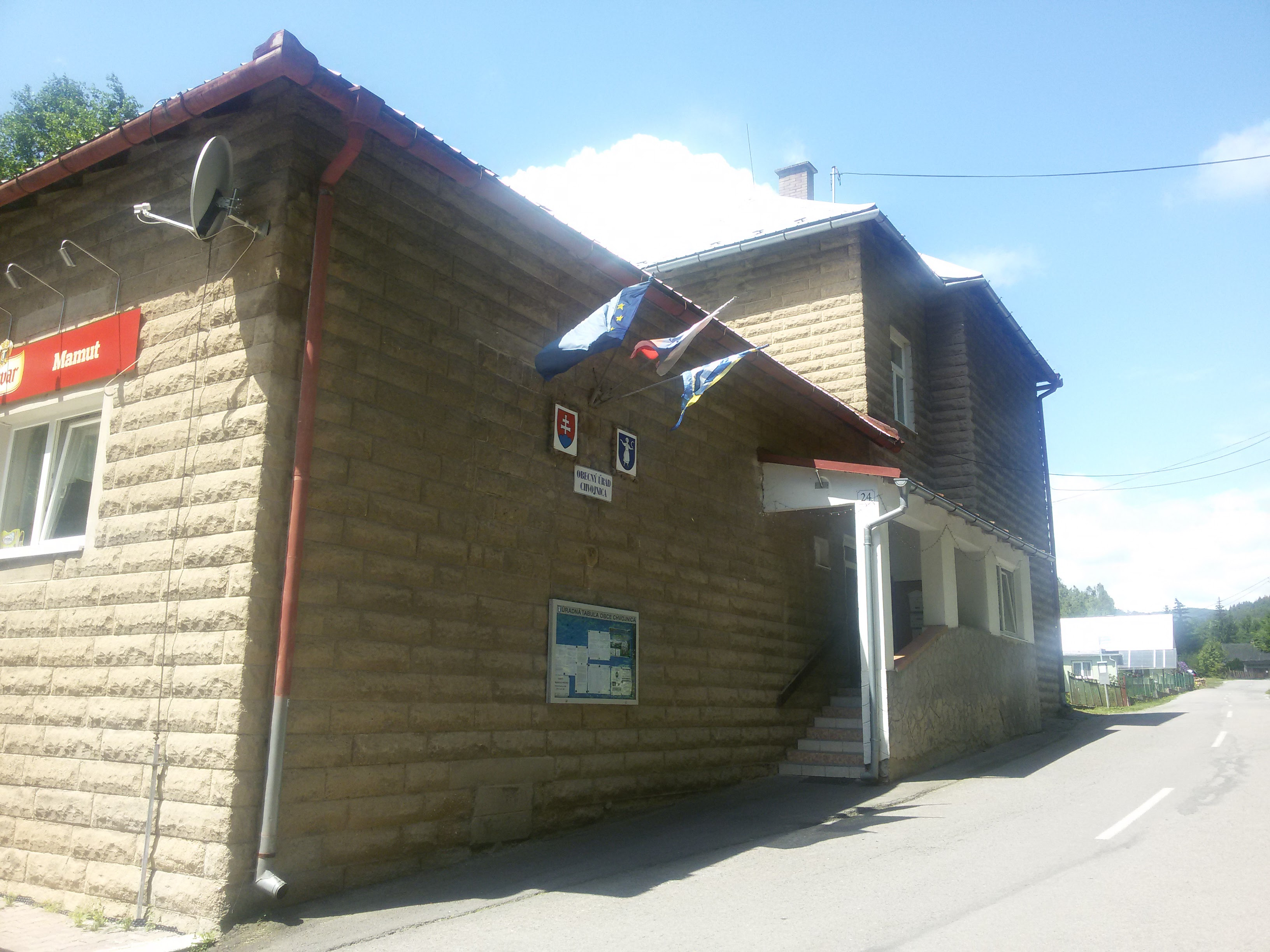 Chvojnica (Prievidza District)